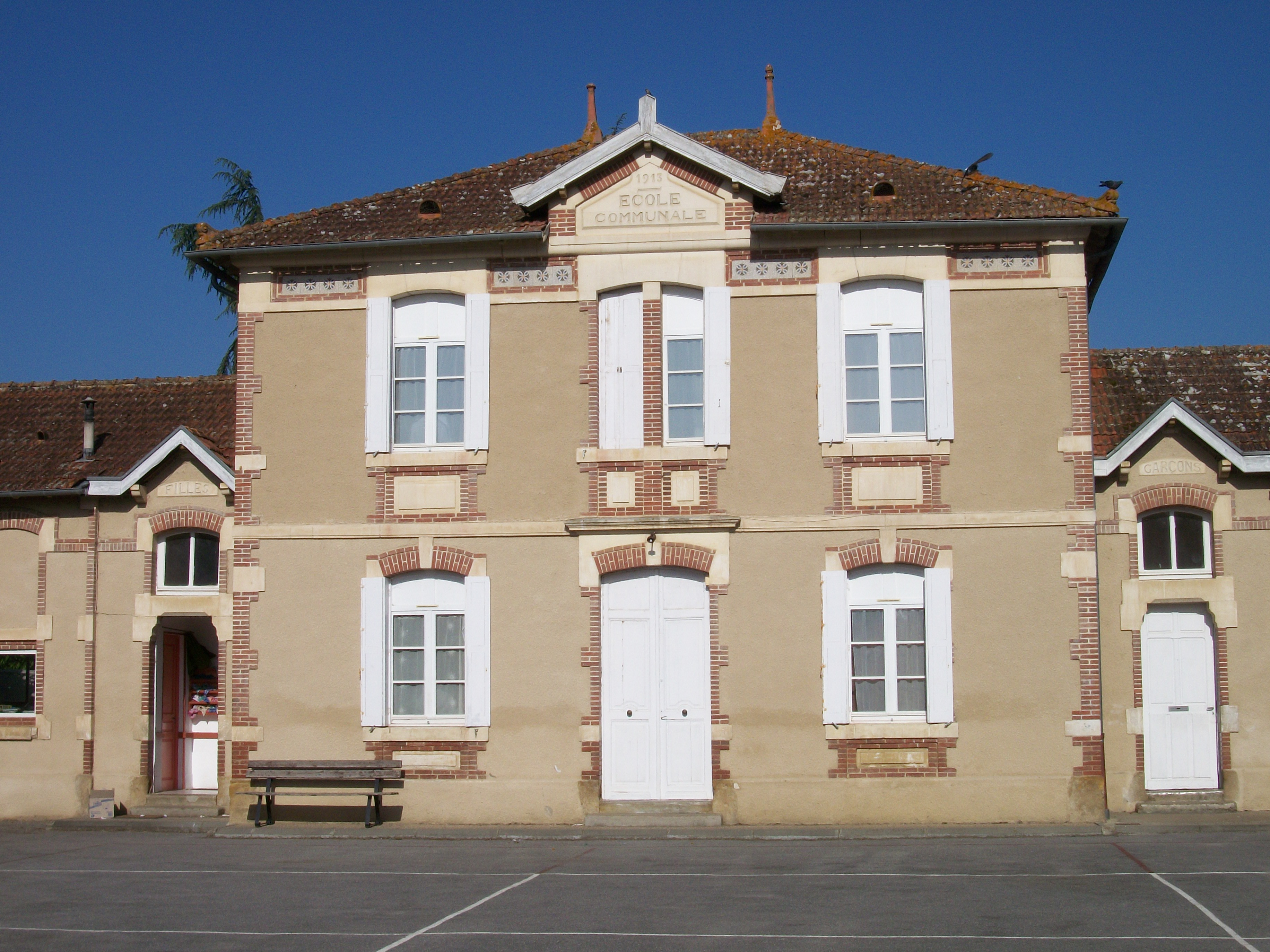 École de Saint-Michel (Gers, France)